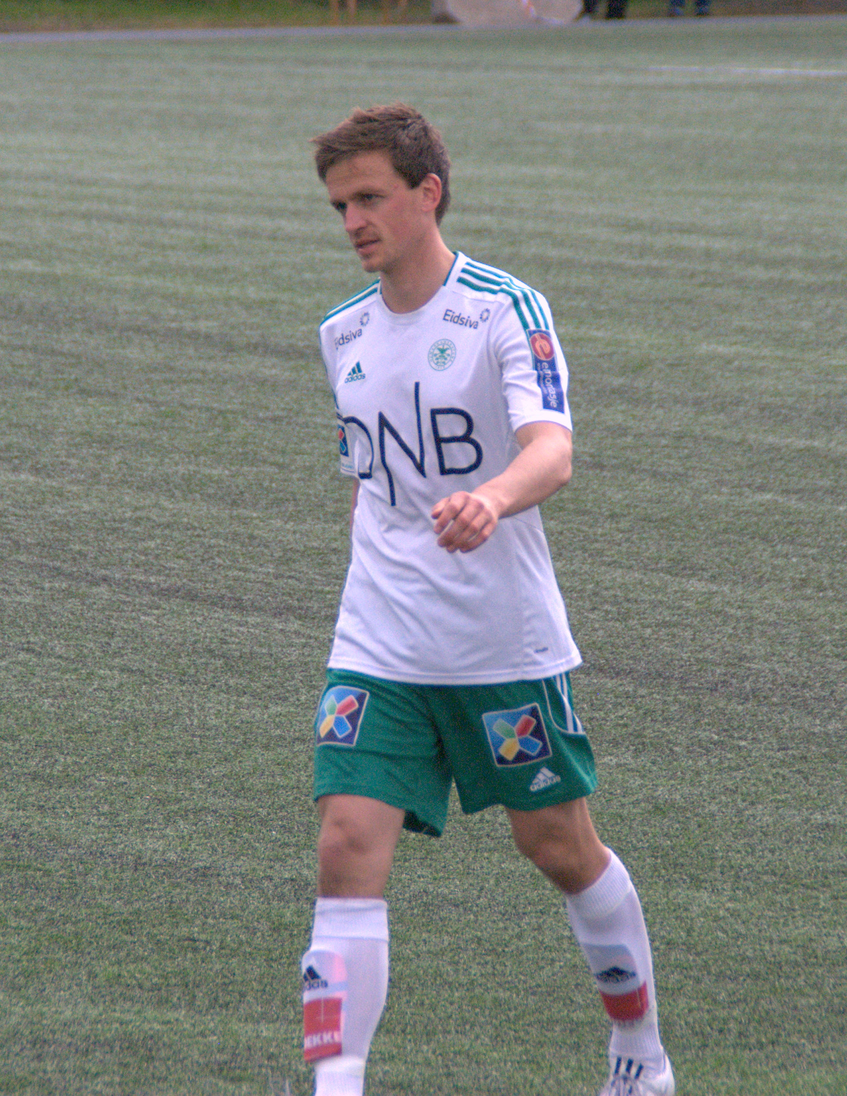 John Anders Rise for Hamarkameratene